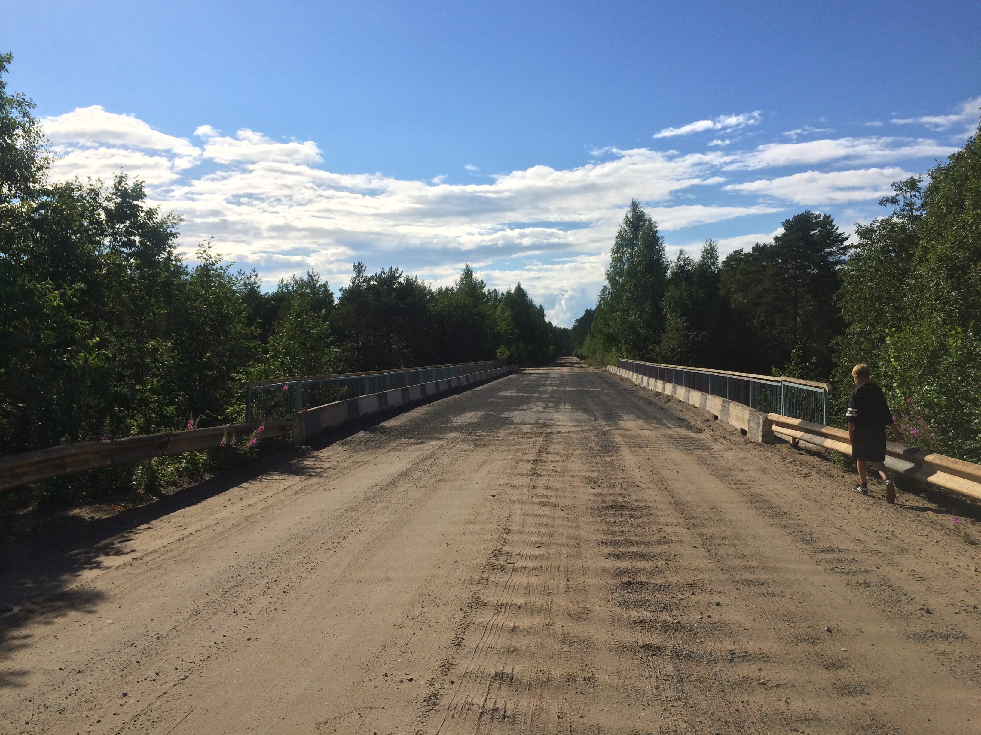 Малая Суна